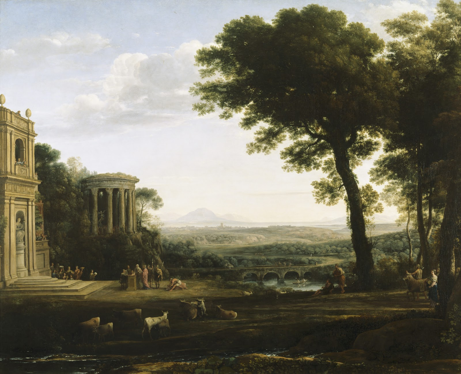 Paisaje con el padre de Psique ofreciendo sacrificios en el templo de Apolo (1663), de Claude Lorrain, óleo sobre lienzo, 174 x 220 cm, National Trust, Anglesey Abbey, Lode (Cambridgeshire).